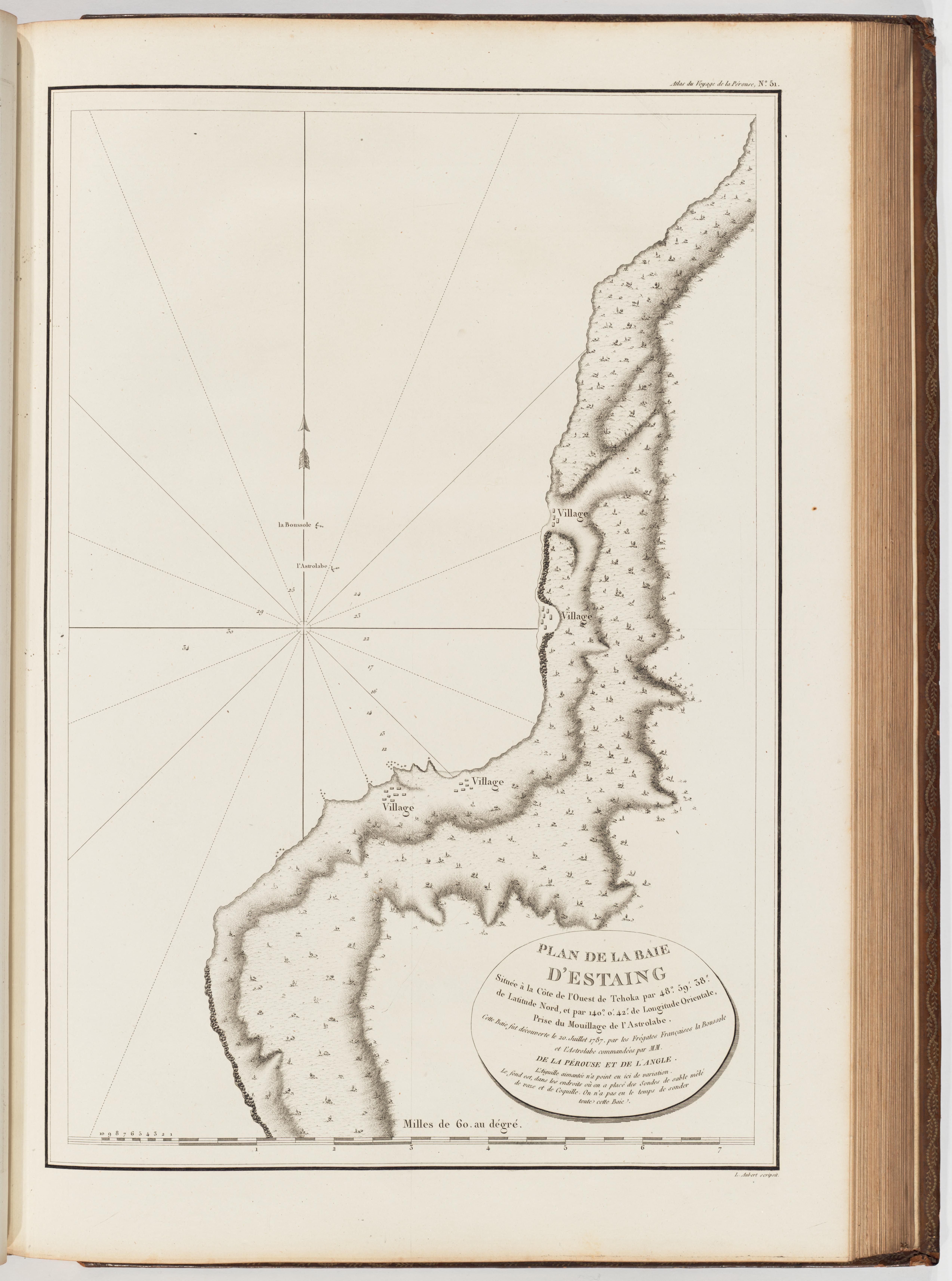 Voyage de La Pérouse autour du monde /publié conformément au décret du 22 avril 1791, et rédigé par L.A. Milet-Mureau.